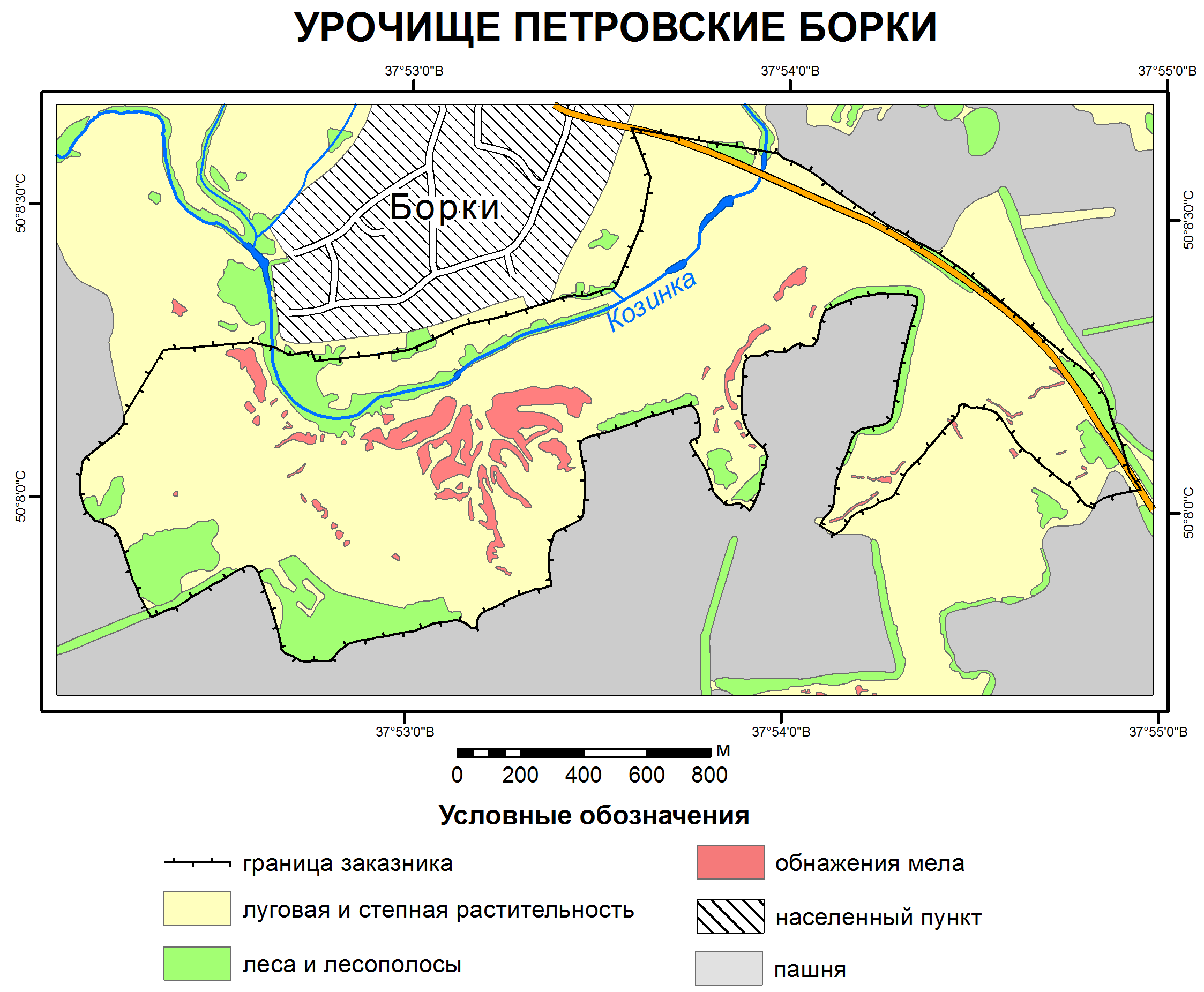 Схема заказника регионального значения Борки This image is related to the protected area of Russia number 3130105